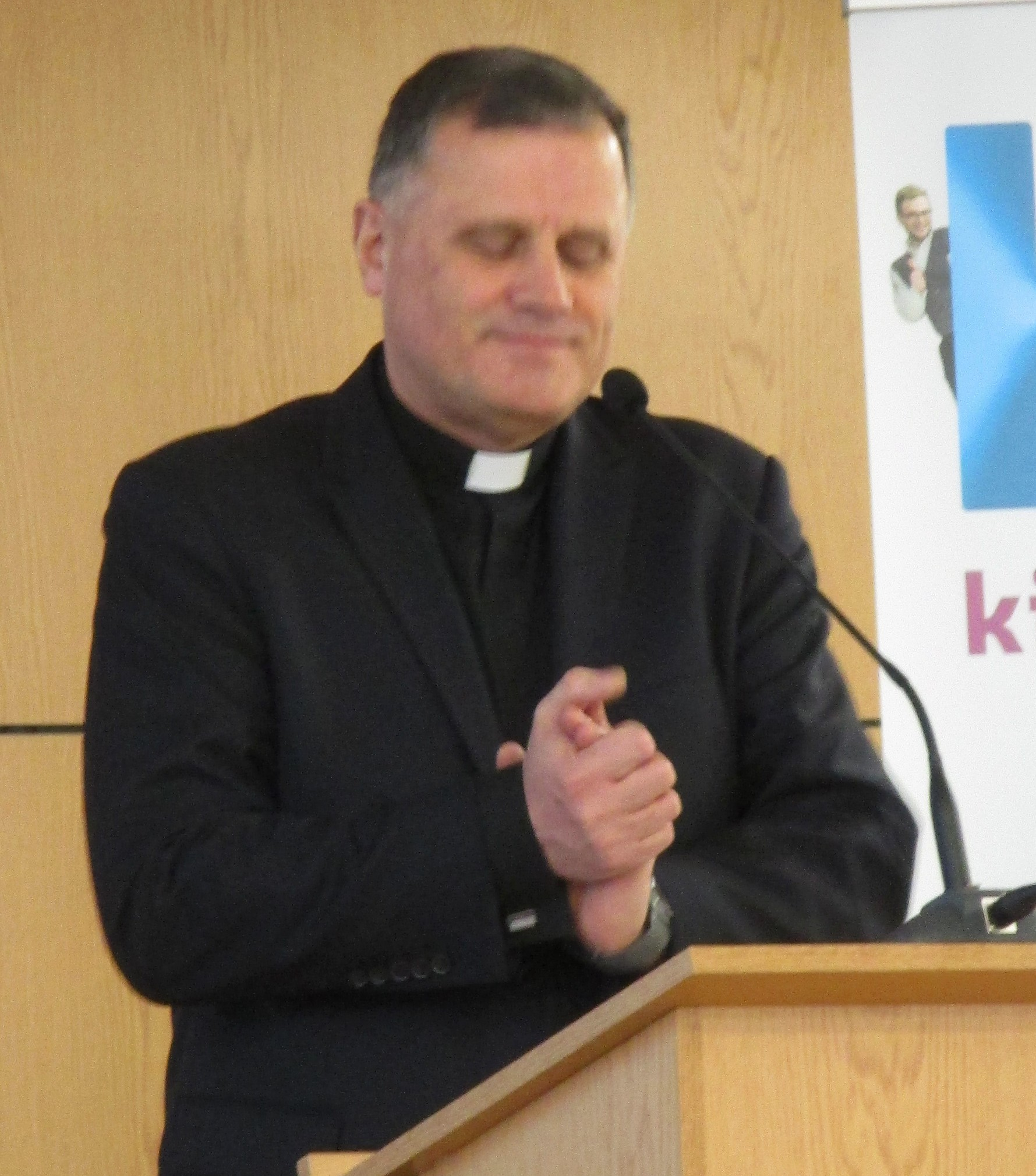 Antoni Dębiński, rektor Katolickiego Uniwersytetu Lubelskiego Jana Pawła II